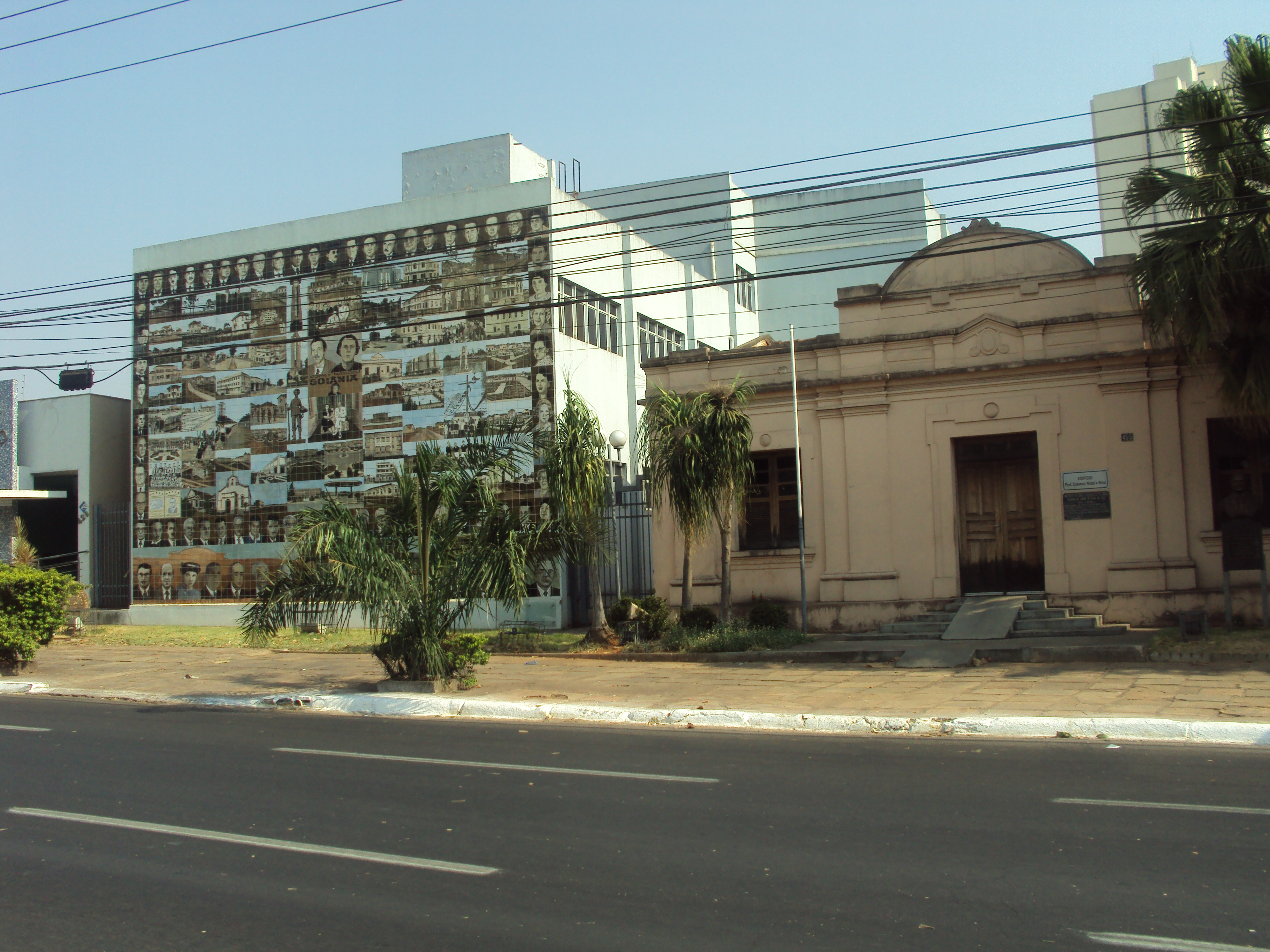 Localizado na Praça Cívica, em Goiânia_GO. A primeira edificação (características art déco) foi inaugurada no dia 5 de outubro de 1939. Posteriormente, foi construído ao lado da sede antiga, na confluência das ruas 82 e 85, no setor Sul, um novo prédio, com fachada em azulejos pintados. (2010)